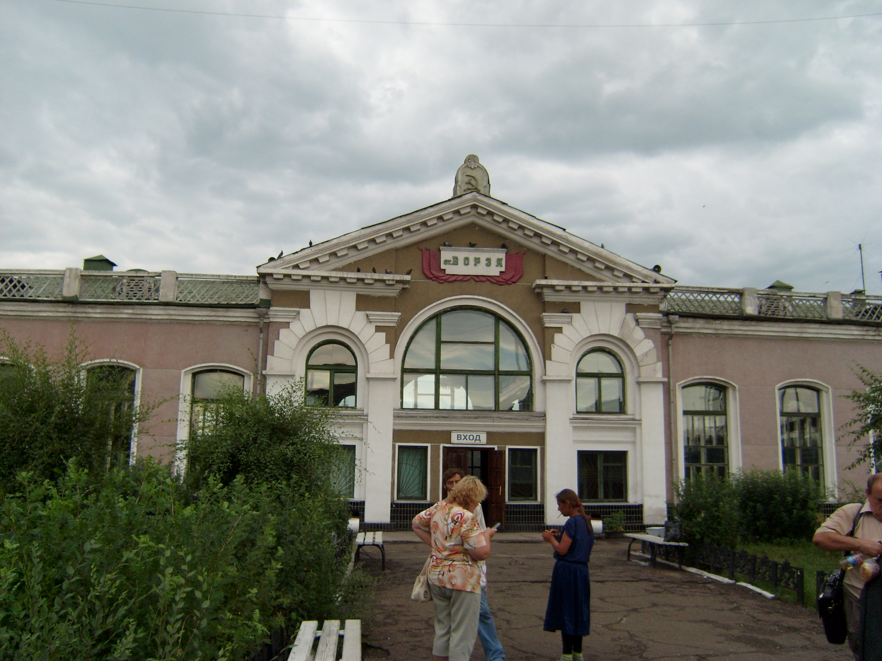 станция Борзя